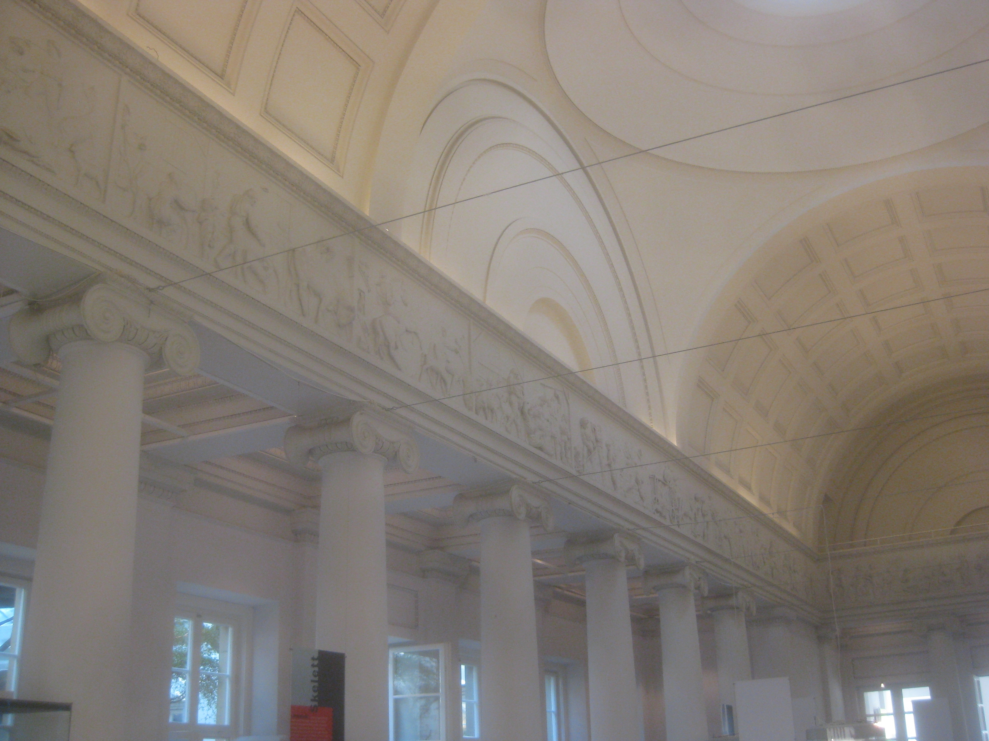 Säulenhalle (ehemals „Festsaal“) von Schloss Rosenstein in Stuttgart. Blick zum Foyer und auf das Tonnengewölbe. Zwischen Säulen und Gewölbe: Teil des Vierjahreszeitenfrieses von Conrad Weitbrecht.